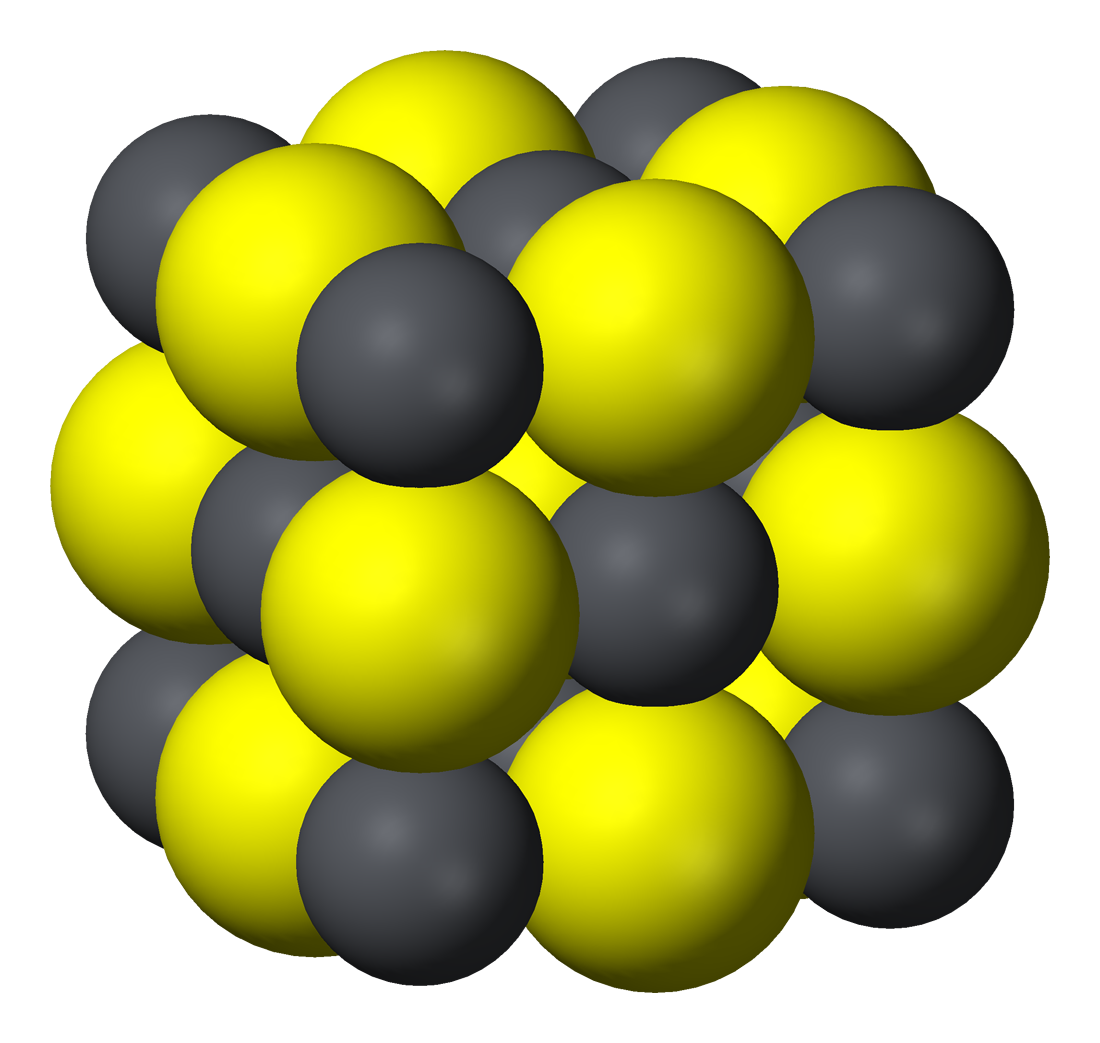 Lattice model of lead(II) sulfide, PbS.